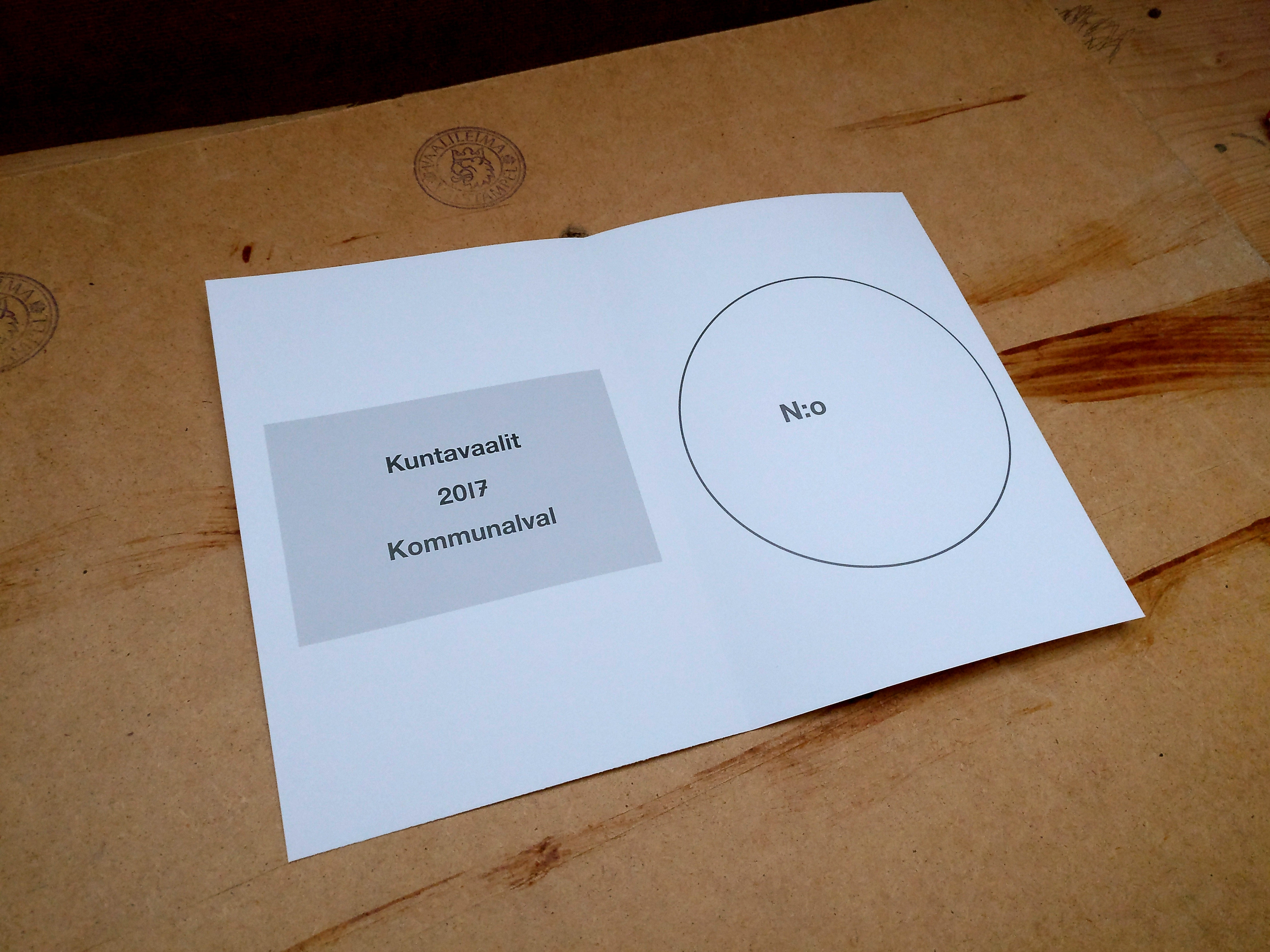 Kuntavaalien 2017 äänestyslippu.